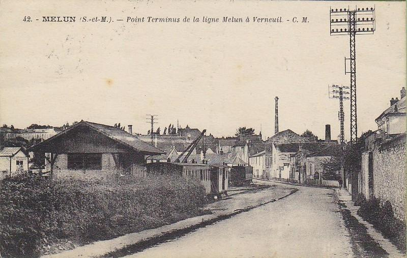 Terminus Melun-Ville au début du XXème siècle.